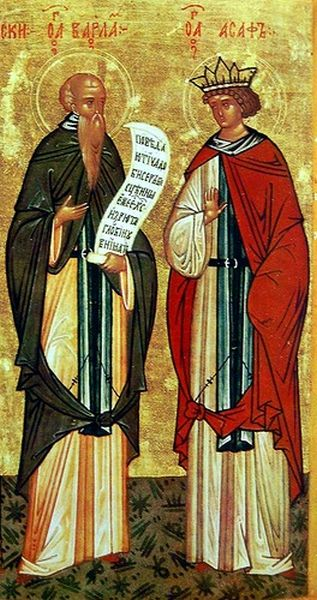 Фрагмент иконы: преподобный Афанасий Афонский, Варлаам Индийский, Иоасаф Индийский. Конец XV — начало XVI вв. Из собора Св. Софии в Новгороде. Новгородский гос. историко-архитектурный и художественный музей-заповедник, Новгород, Россия. Инв. № 3094